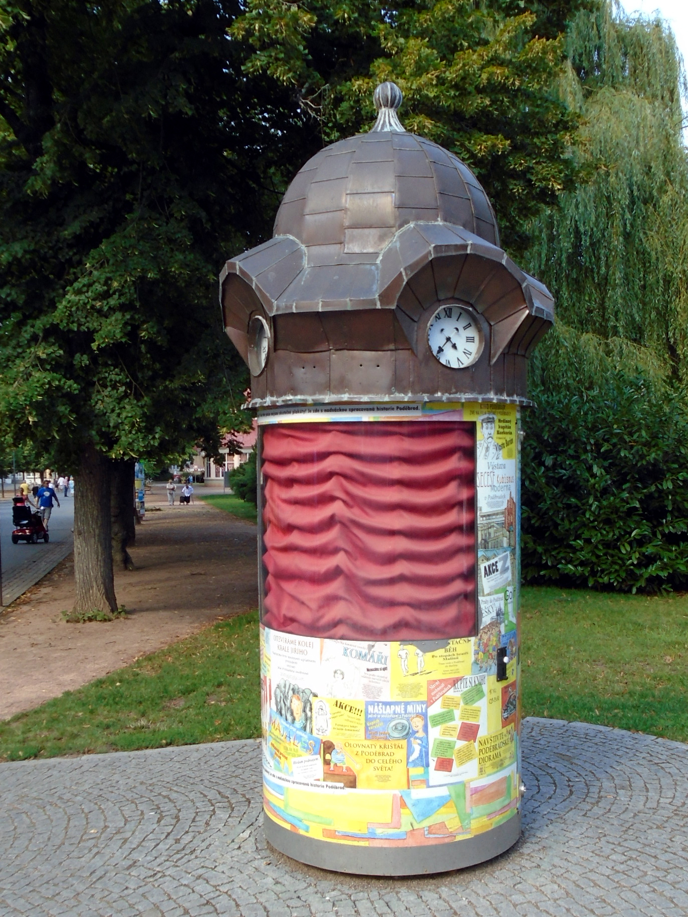 Poděbradský orloj od Lucie Seifertová